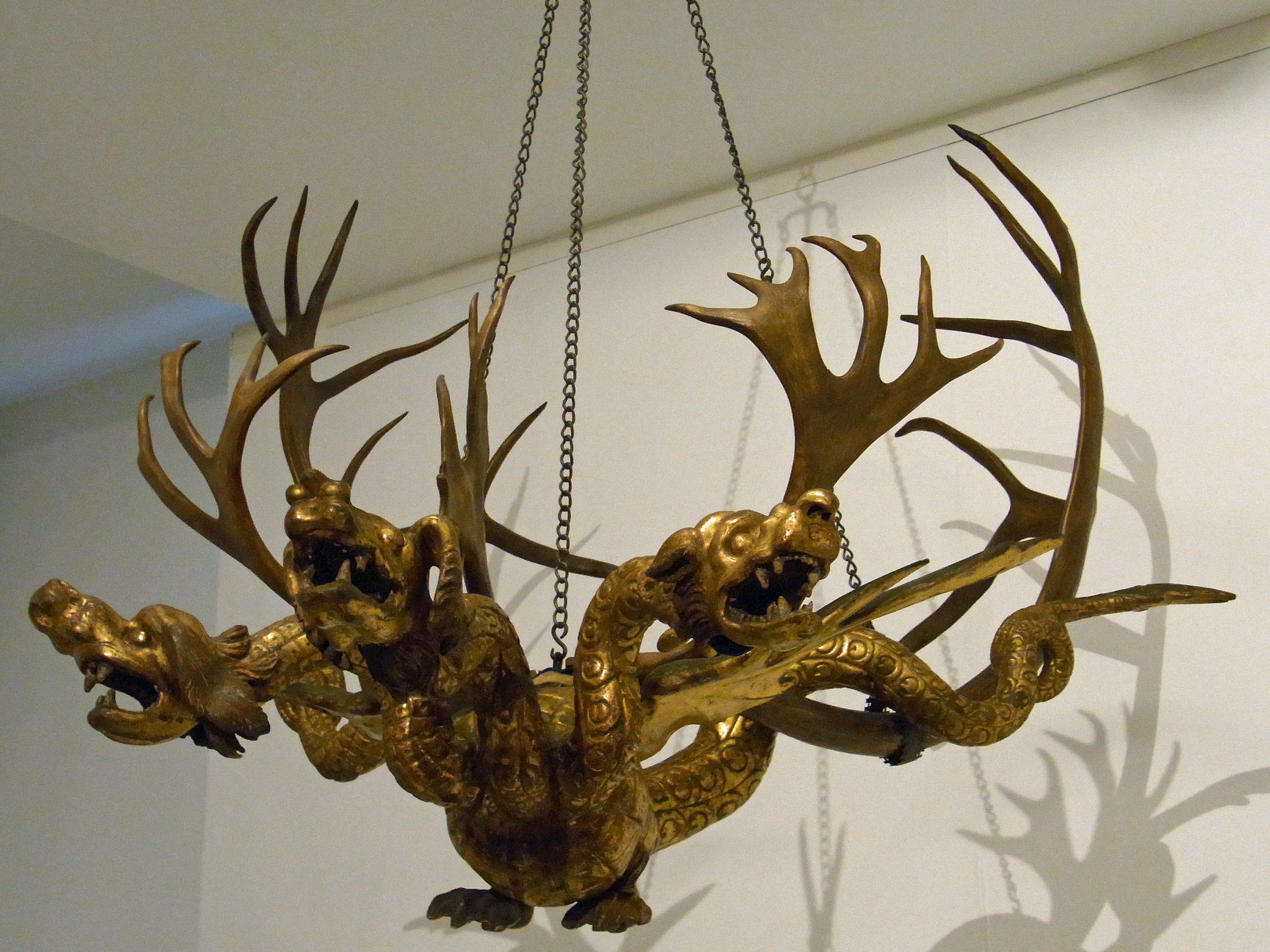 Dreiköpfiger Drache Germany, Mittel-Franken, Nuremberg